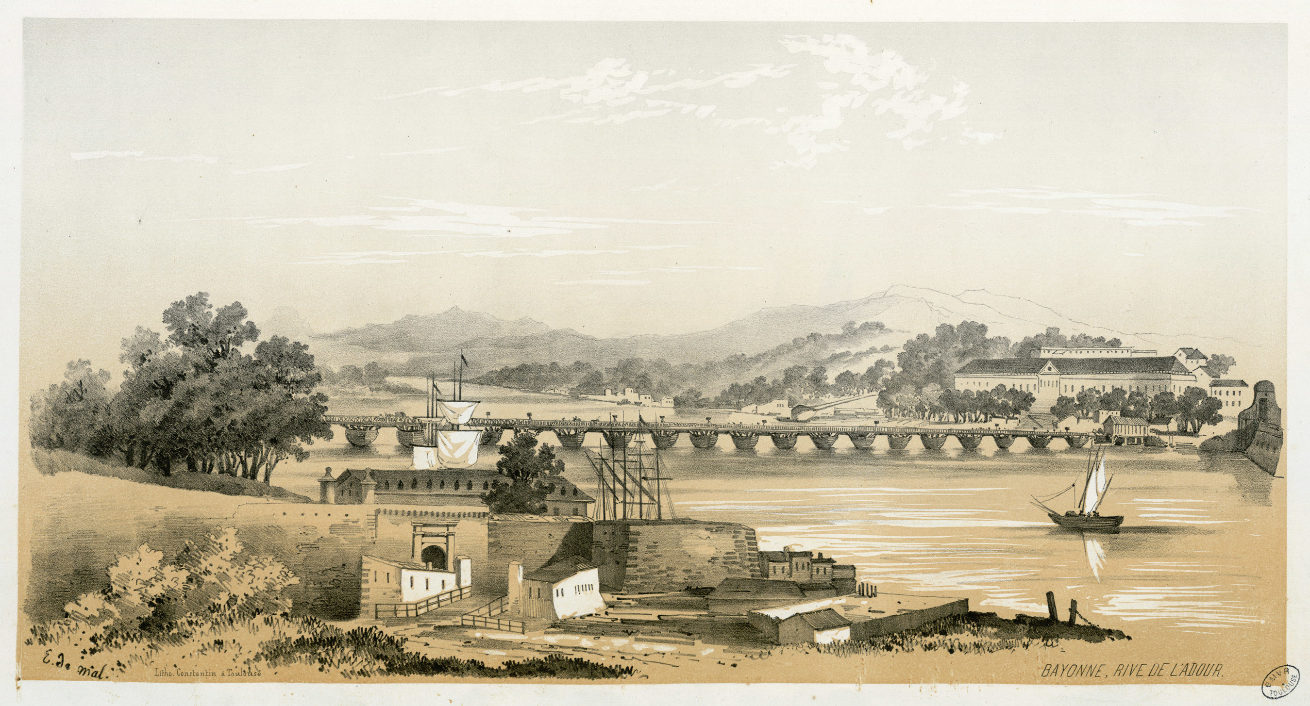 Lithographie représentant le pont flottant de Bayonne détruit en 1848 Fait partie d'un recueil de 15 planches lithographiées en camaïeu avec titre lithographié Ancely, René (1876 - 1966). Possesseur